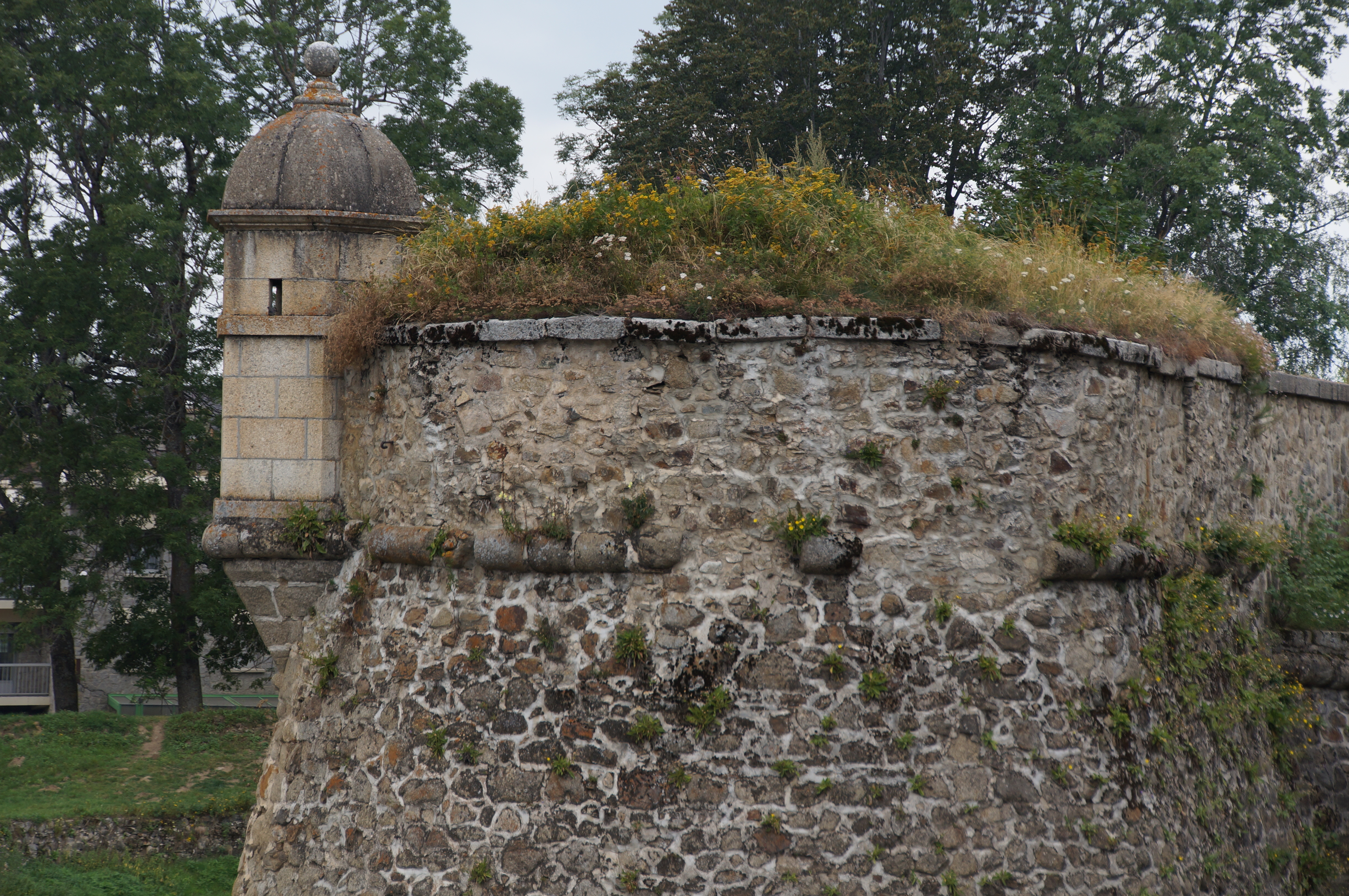 Ciutadella de Montlluís .